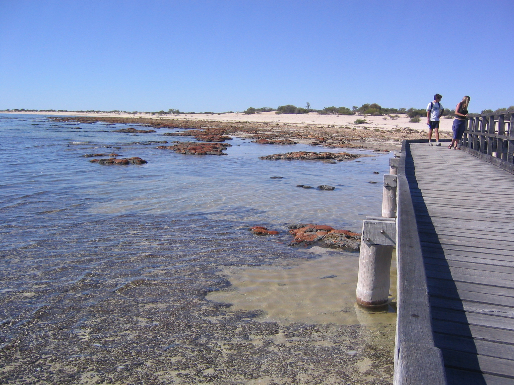 Hamelin Pool (Stromatolites)